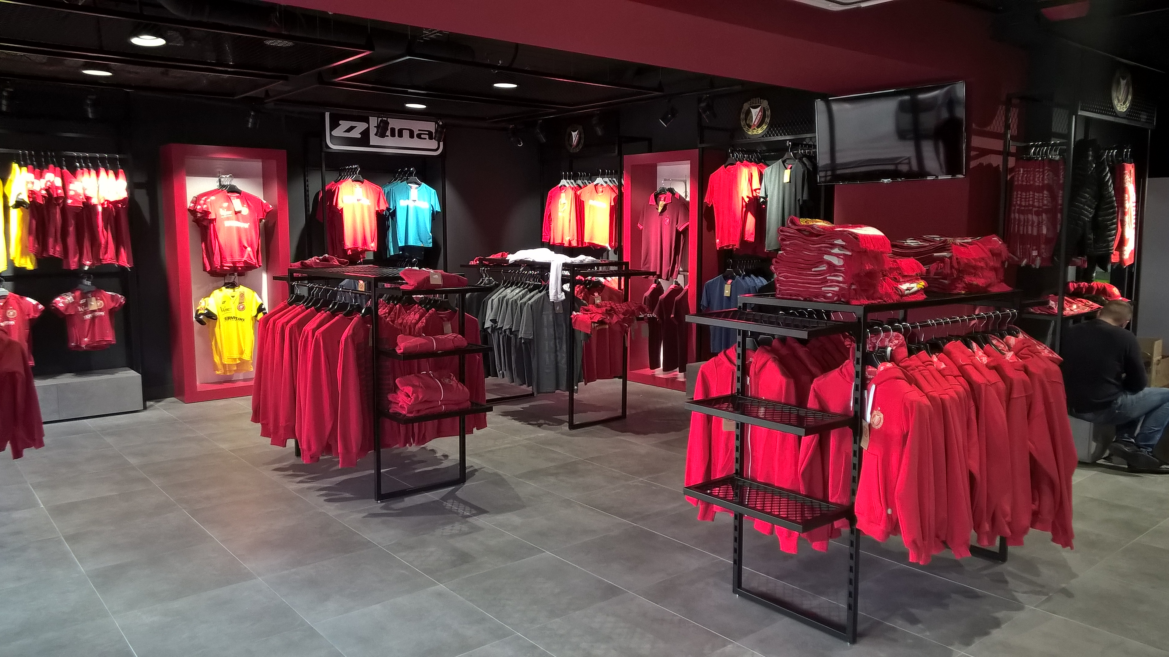 Nowy stadion Widzewa – oficjalny sklep klubowy pod trybuną "D" (wrzesień 2017)